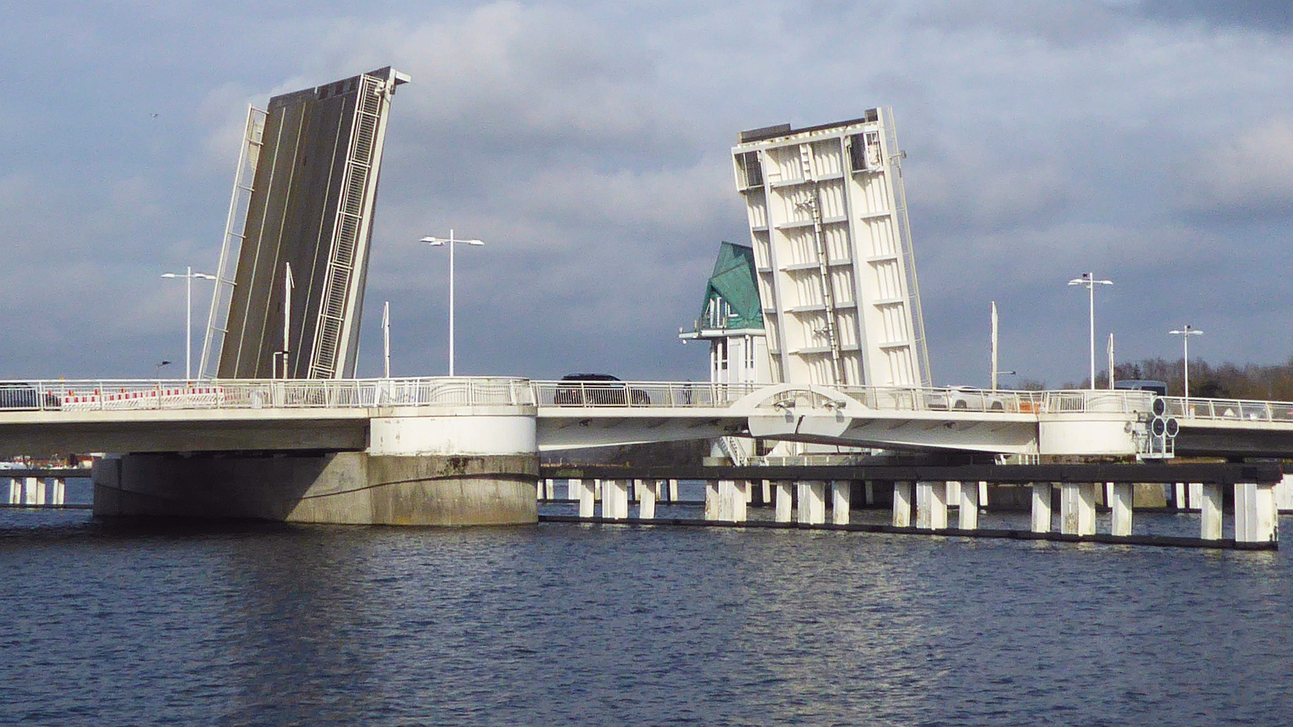 Wartungsarbeiten Nordseite Schleibrücke Kappeln - vorne Südseite mit Gegenverkehr auf 2 Fahrspuren - Foto Wolfgang Pehlemann P1350957.jpg